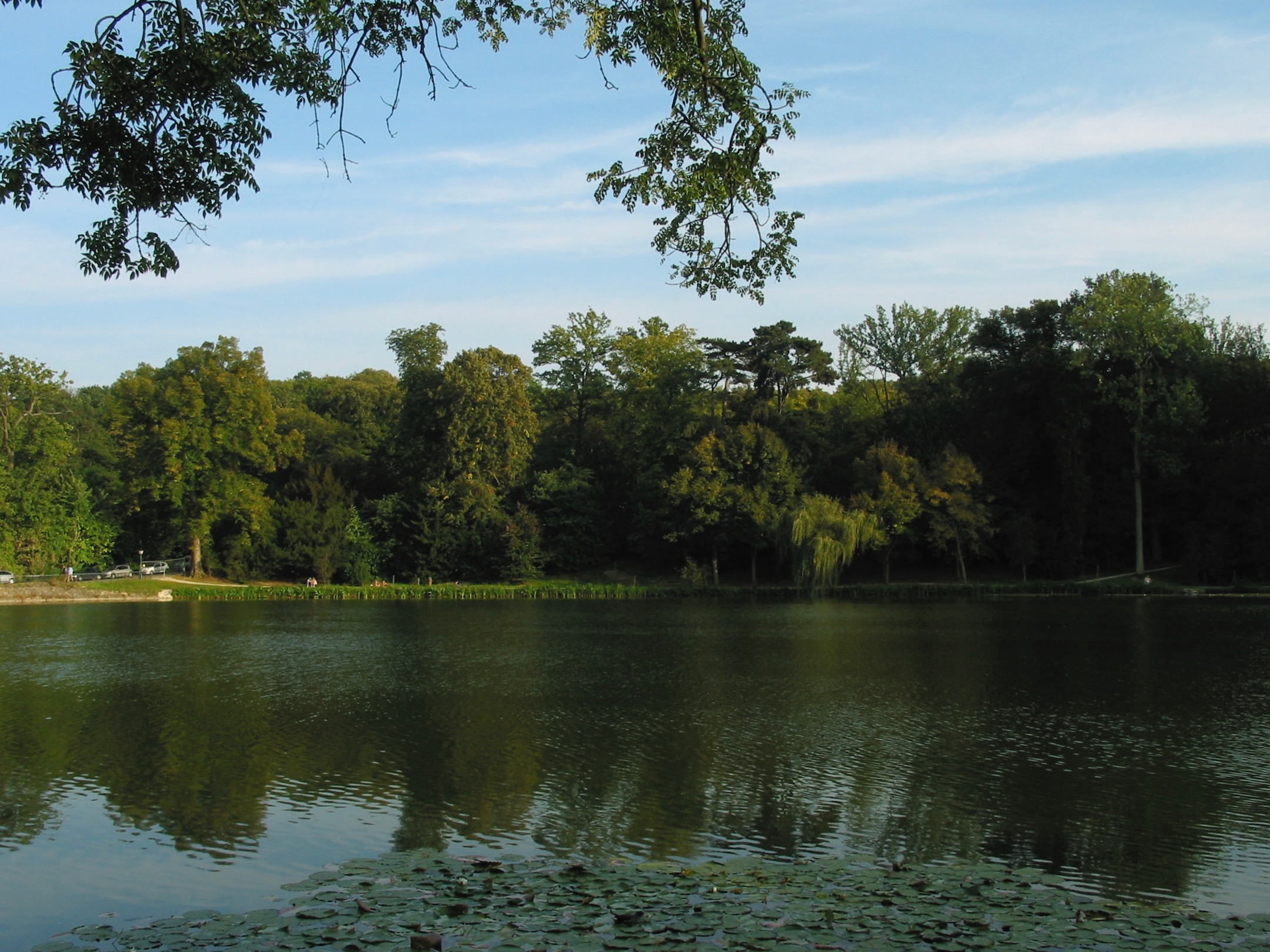 etangs de corot